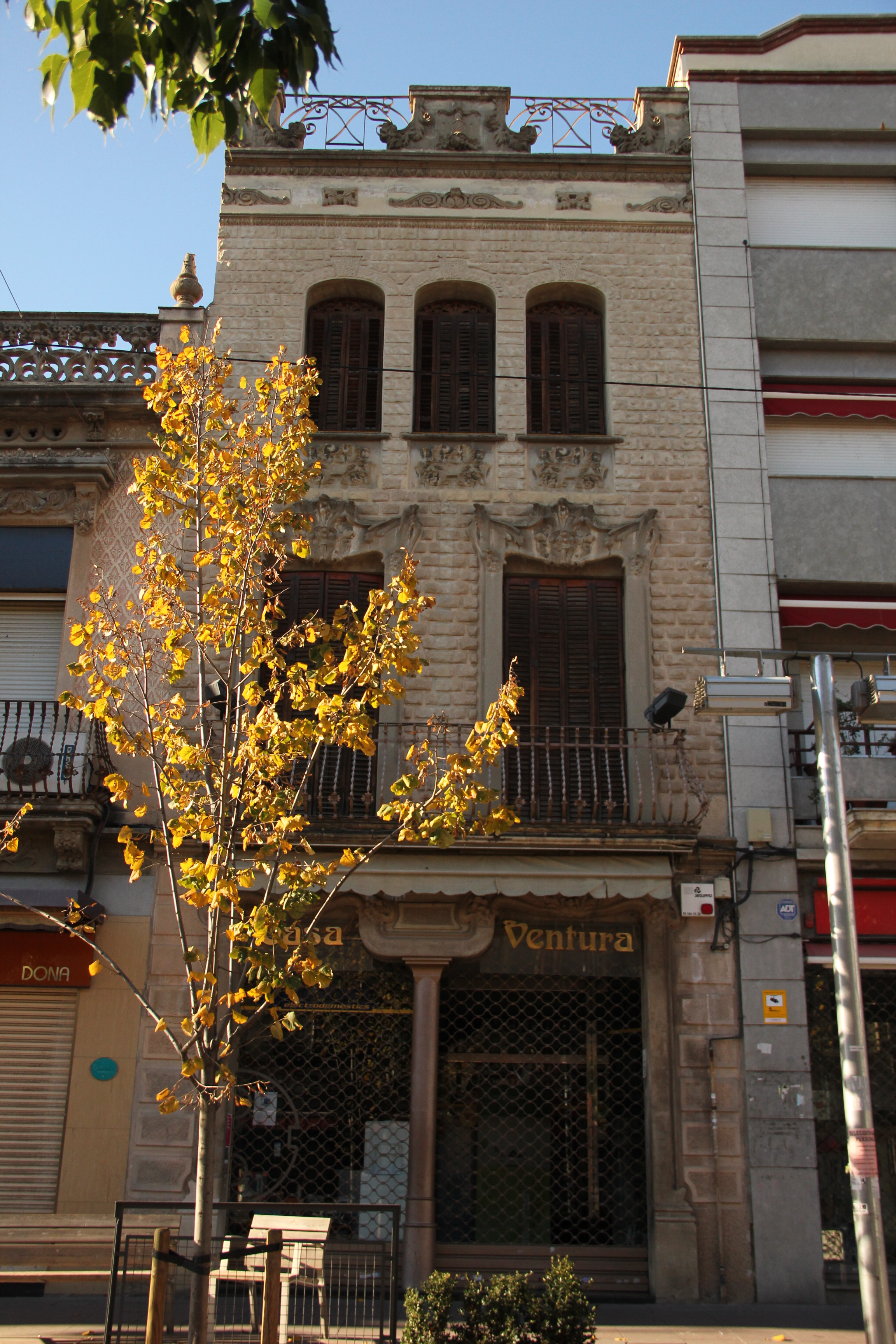 Casa Cuyàs a Montcada i Reixach construïda per Josep Graner i Prat